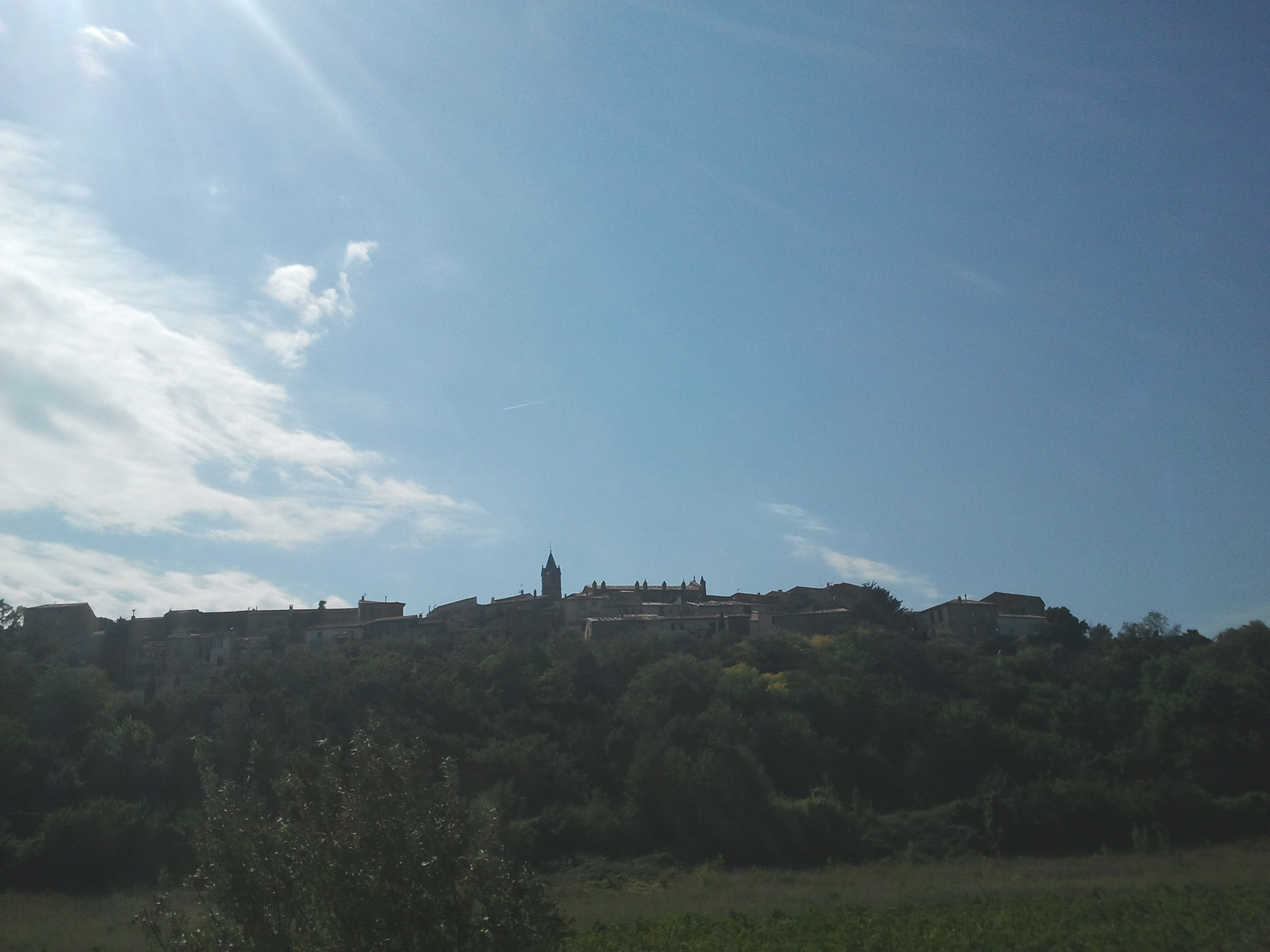 Vue générale de Preixan